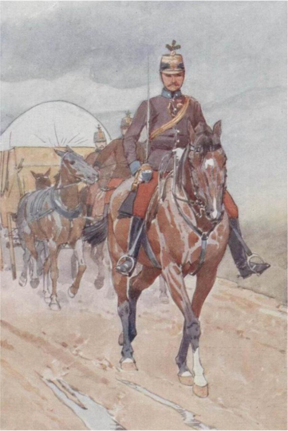 k.u.k. Train